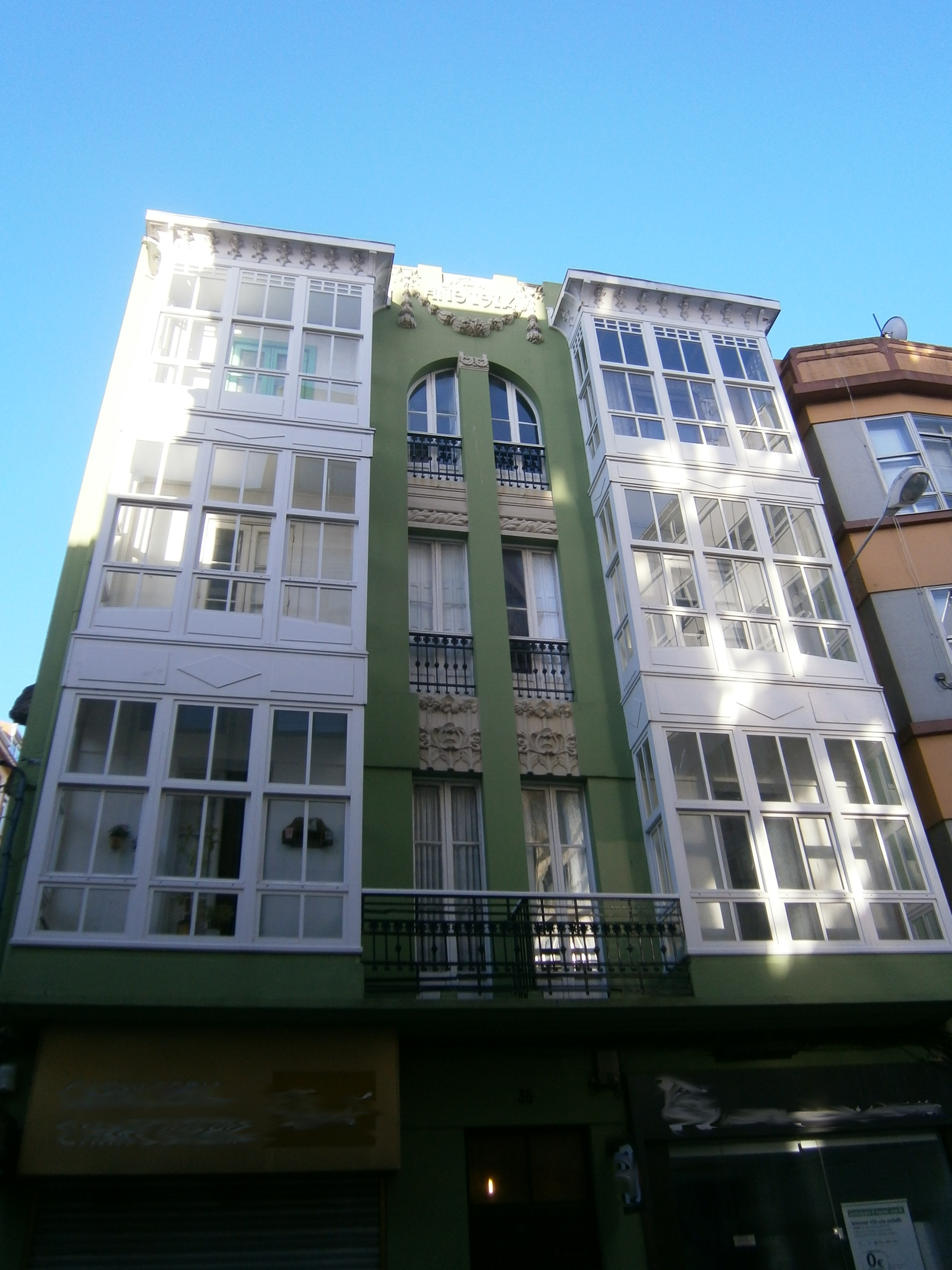 Edificio modernista da rúa da Torre da Coruña